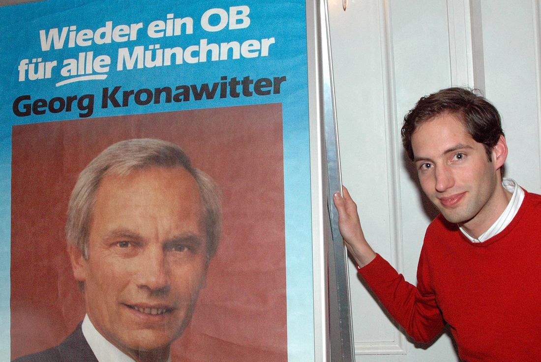 Sohn Florian mit einem Wahlplakat seines Vaters (Georg Kronawitter) von 1984